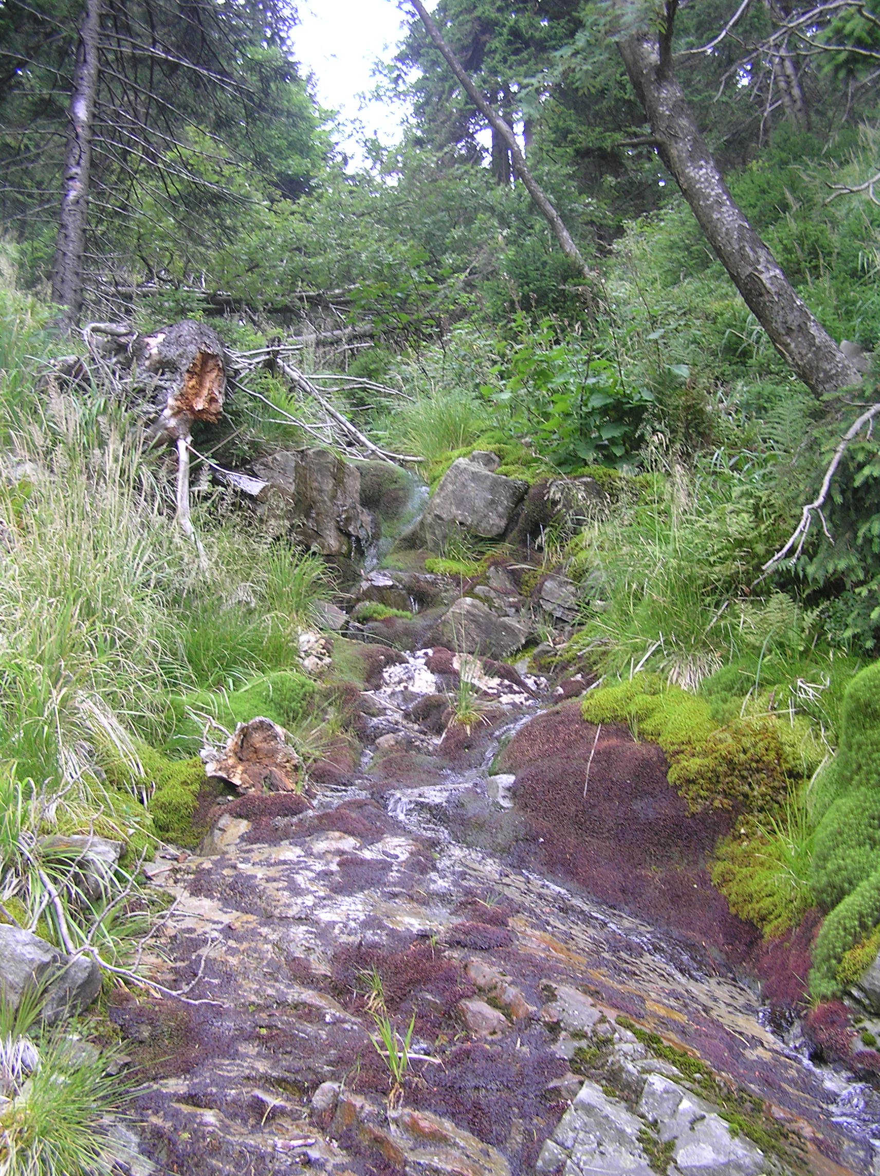 Kamenitý potok, the creek in the Králický Sněžník Mountains, Czech Republic